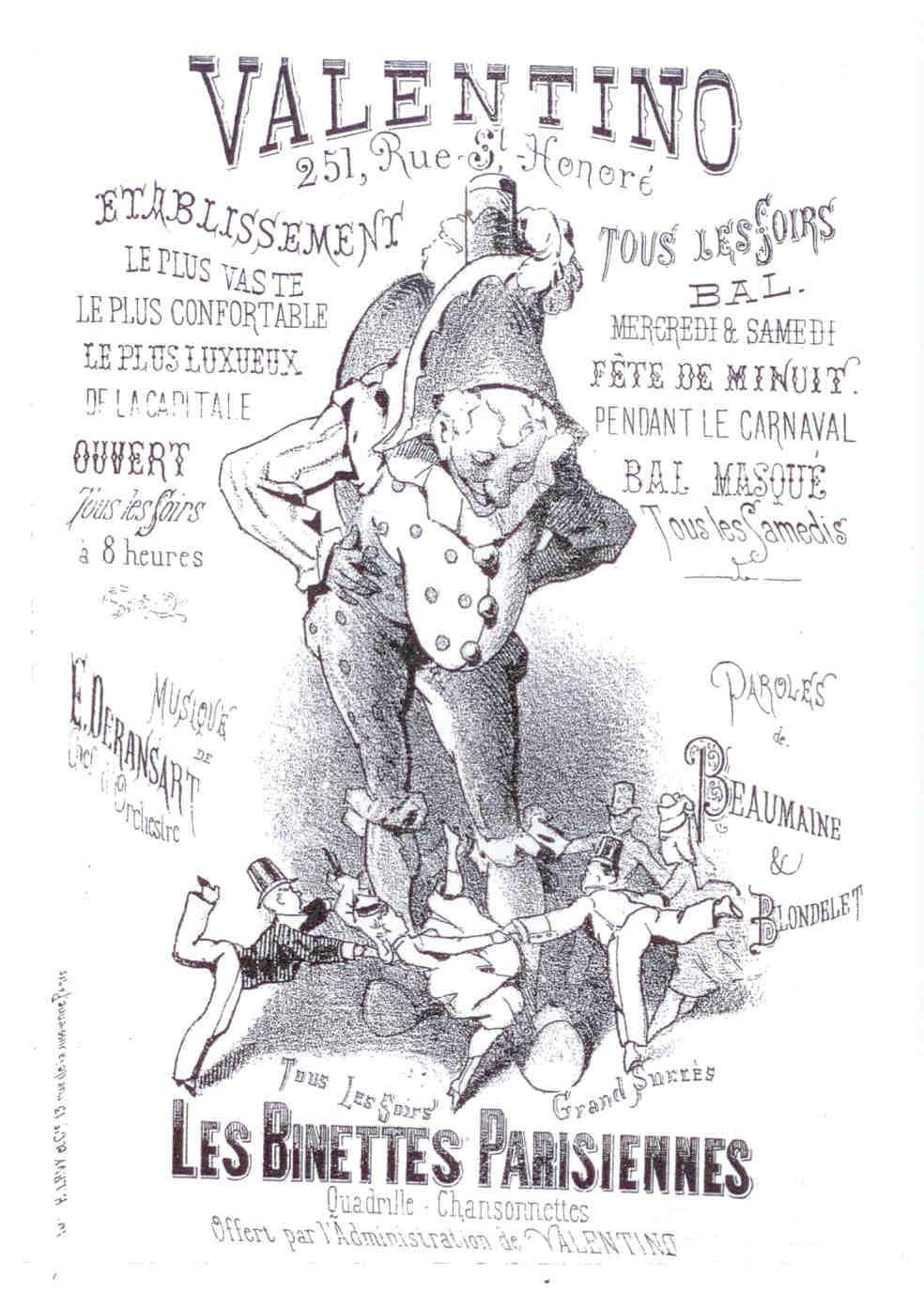 Couverture d'une partition (1 feuillet recto-verso, en tout 4 pages) d'une partition gratuite offerte comme publicité par le Bal Valentino.